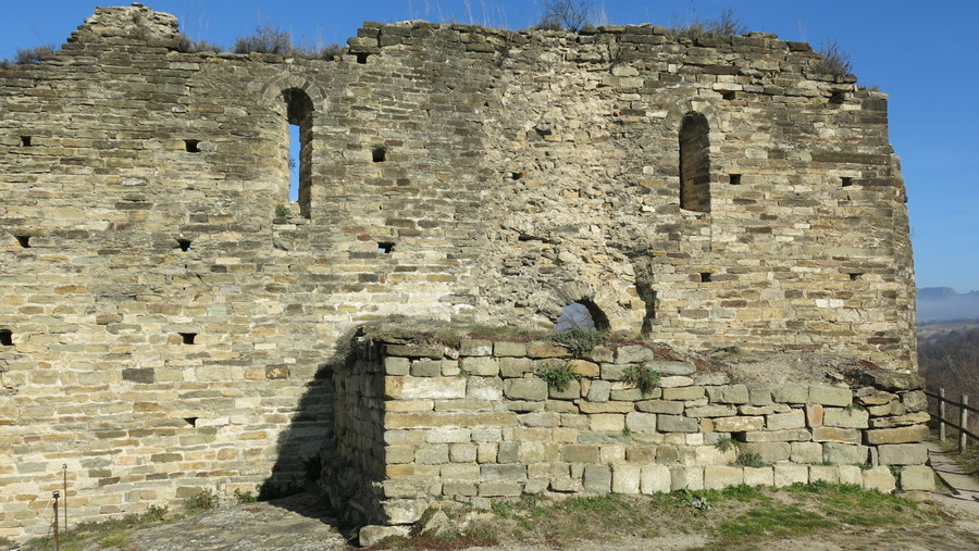 mur de l'antiga església medieval de l'Esquerda, a Les Masies de Roda, comarca: Osona - Catalunya